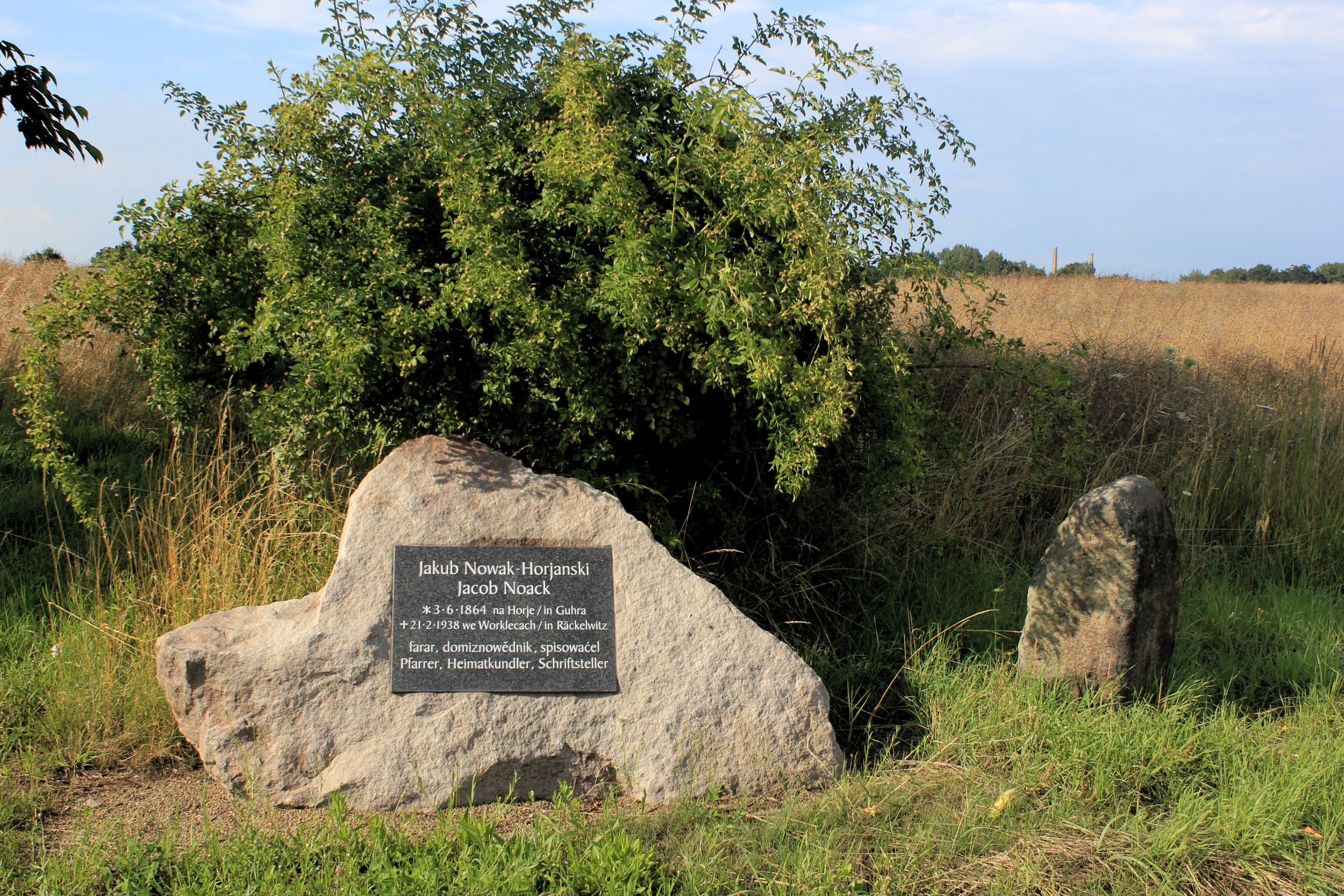 Hornjoserbsce: Pomnik za Jakuba Nowaka-Horjanskeho na Horje.